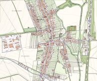 Digitálna mapa Kuzmíc